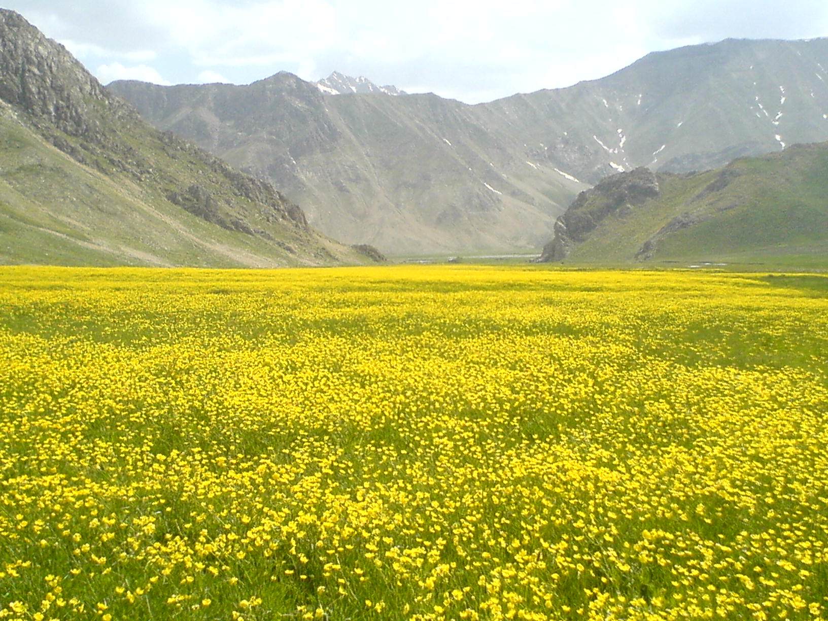 Lar National Park دشت لار، گل زرد آبشار سفیداب، ارتفاعات البرز، کوههای خرسنگ پارک ملی لار مازندران